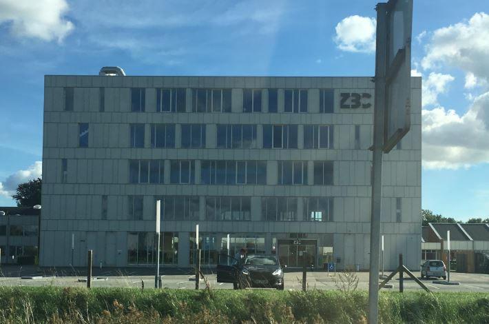 Uddannelsesinstitutionen ZBC i Næstved